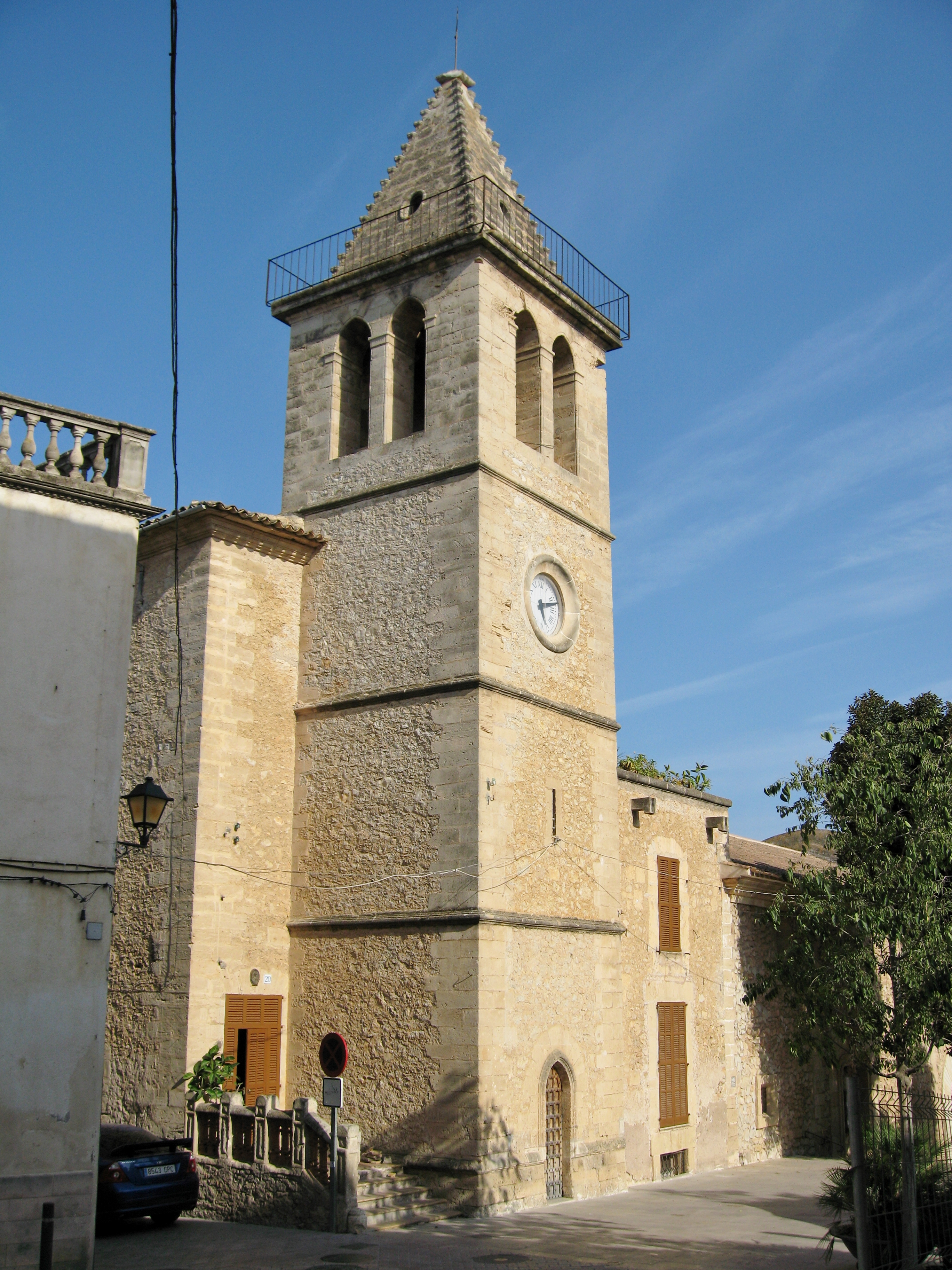 Parròquia de Sant Joan, Son Servera, Mallorca, Spain